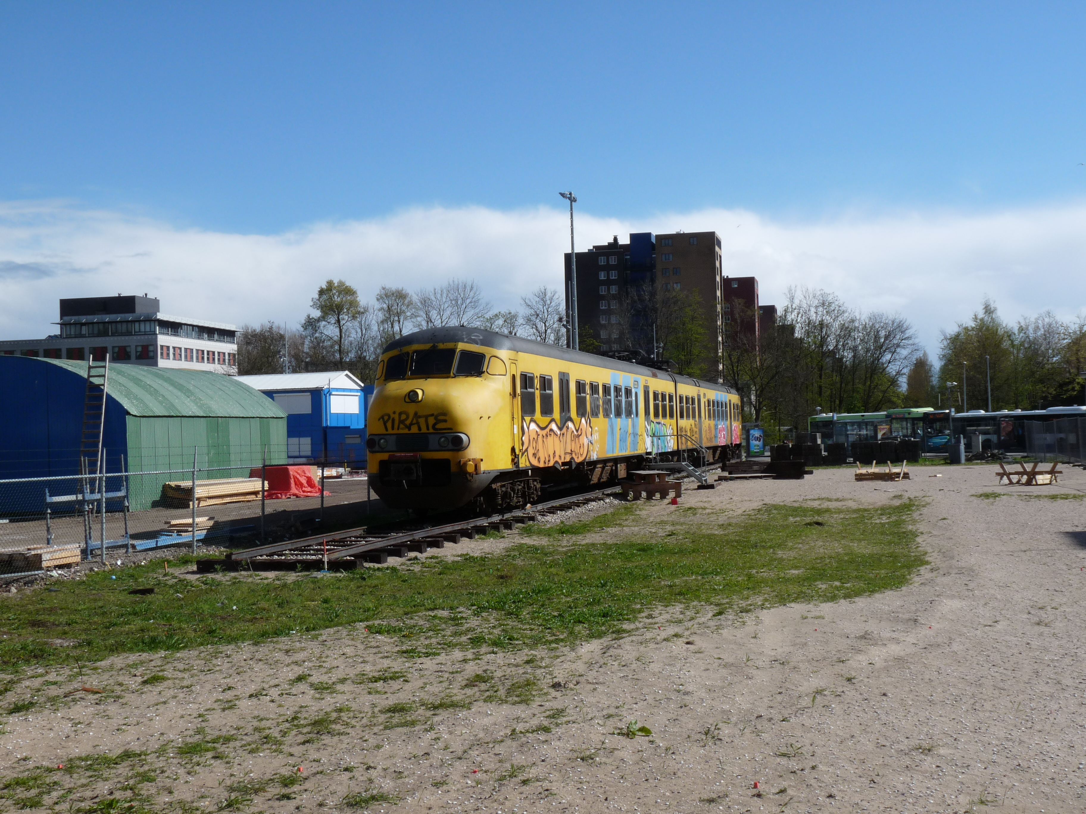 Een afgedankte plan V wordt opgesteld bij het station Lelylaan. Volgens deze bron wordt het een restaurant.